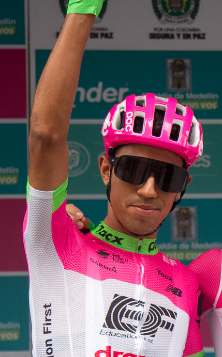 Daniel Martínez en el campeonato nacional de ciclismo de Colombia 2018